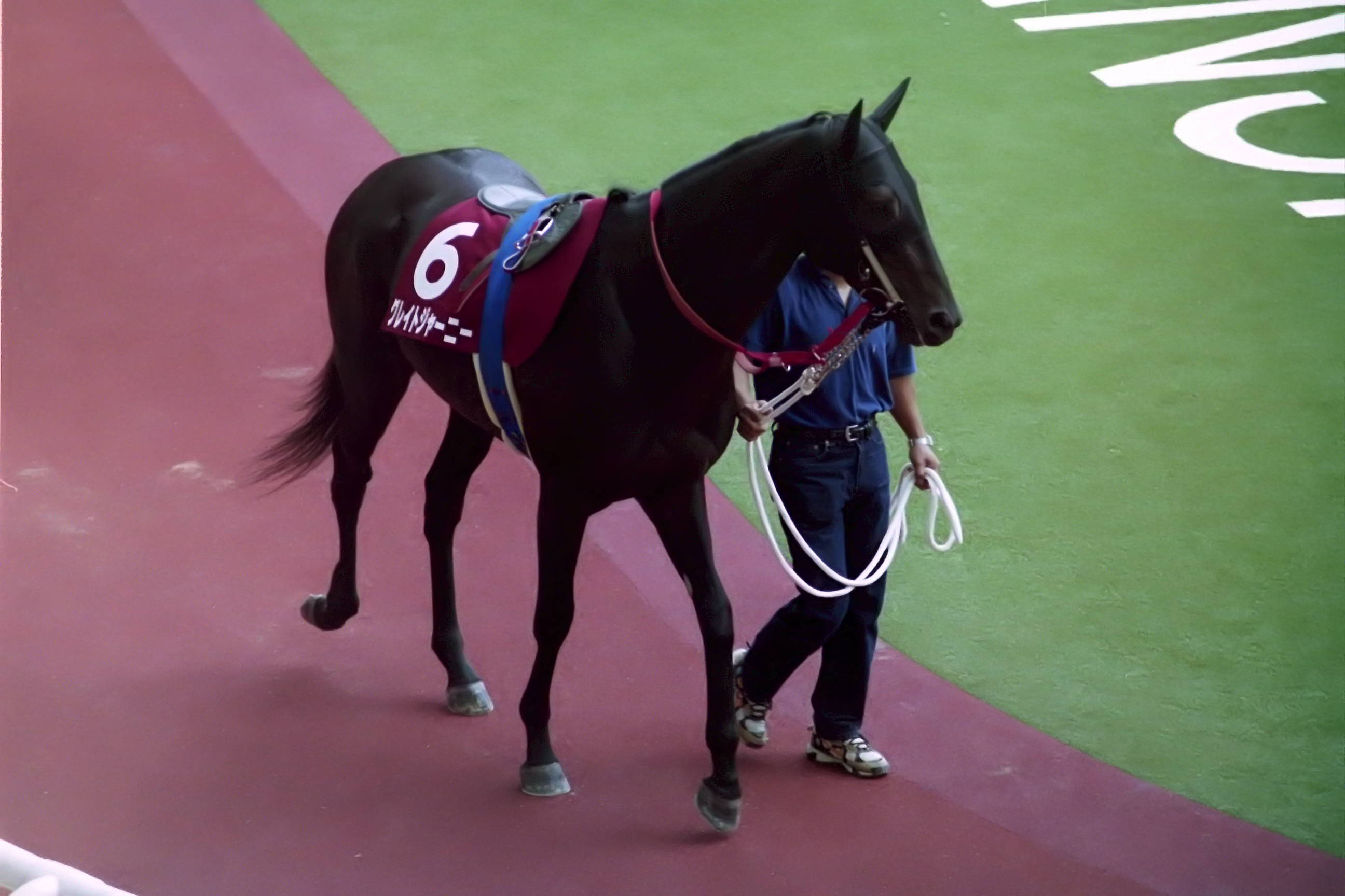 グレイトジャーニー号